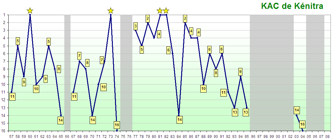 Graphe historique des classements du KAC en championnat